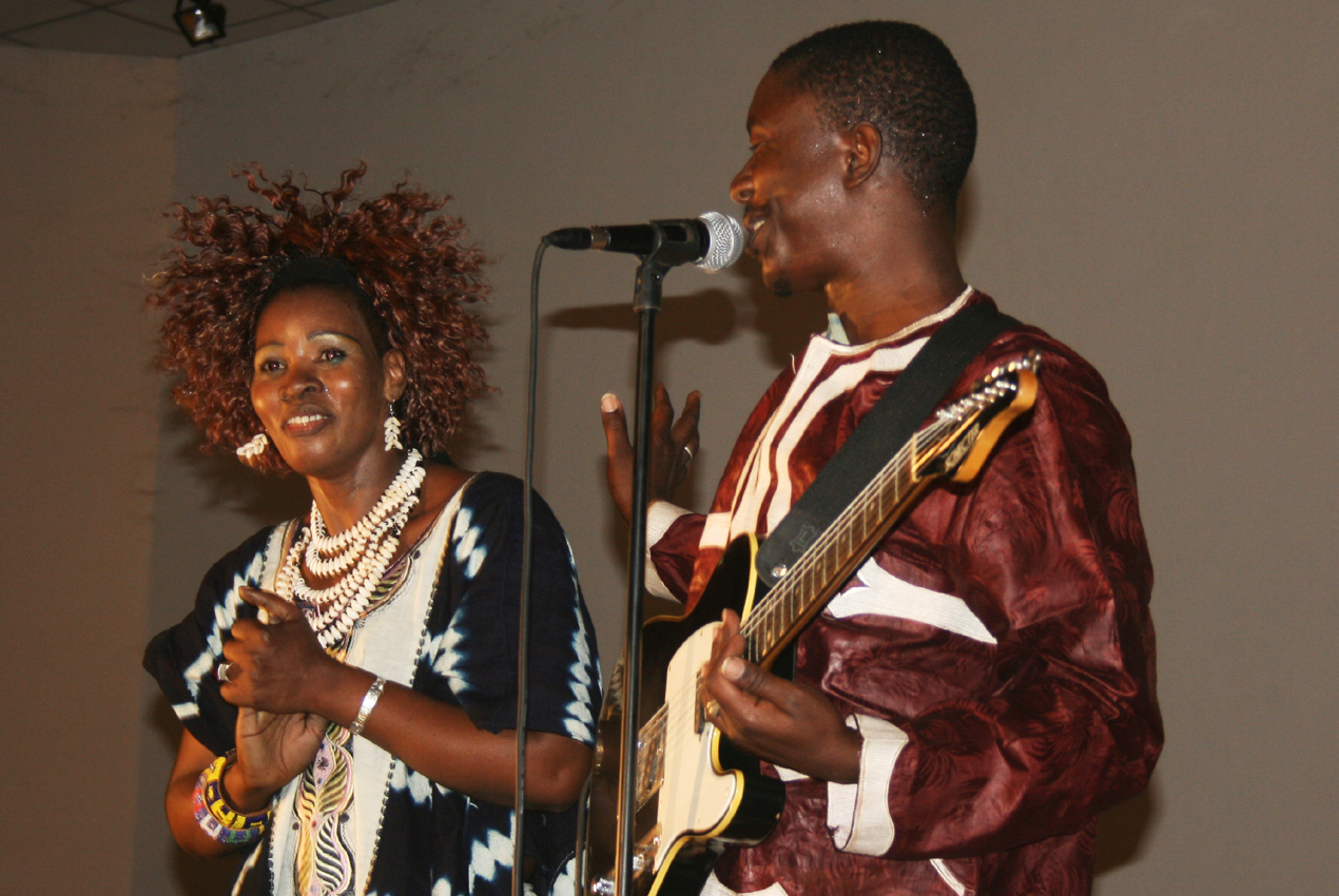 La chanteuse malienne Maria Sidibé dite Sadio avec le chanteur malien Baba Salah au Festival de Kayes-Médine-Tamba à Kayes en février 2009